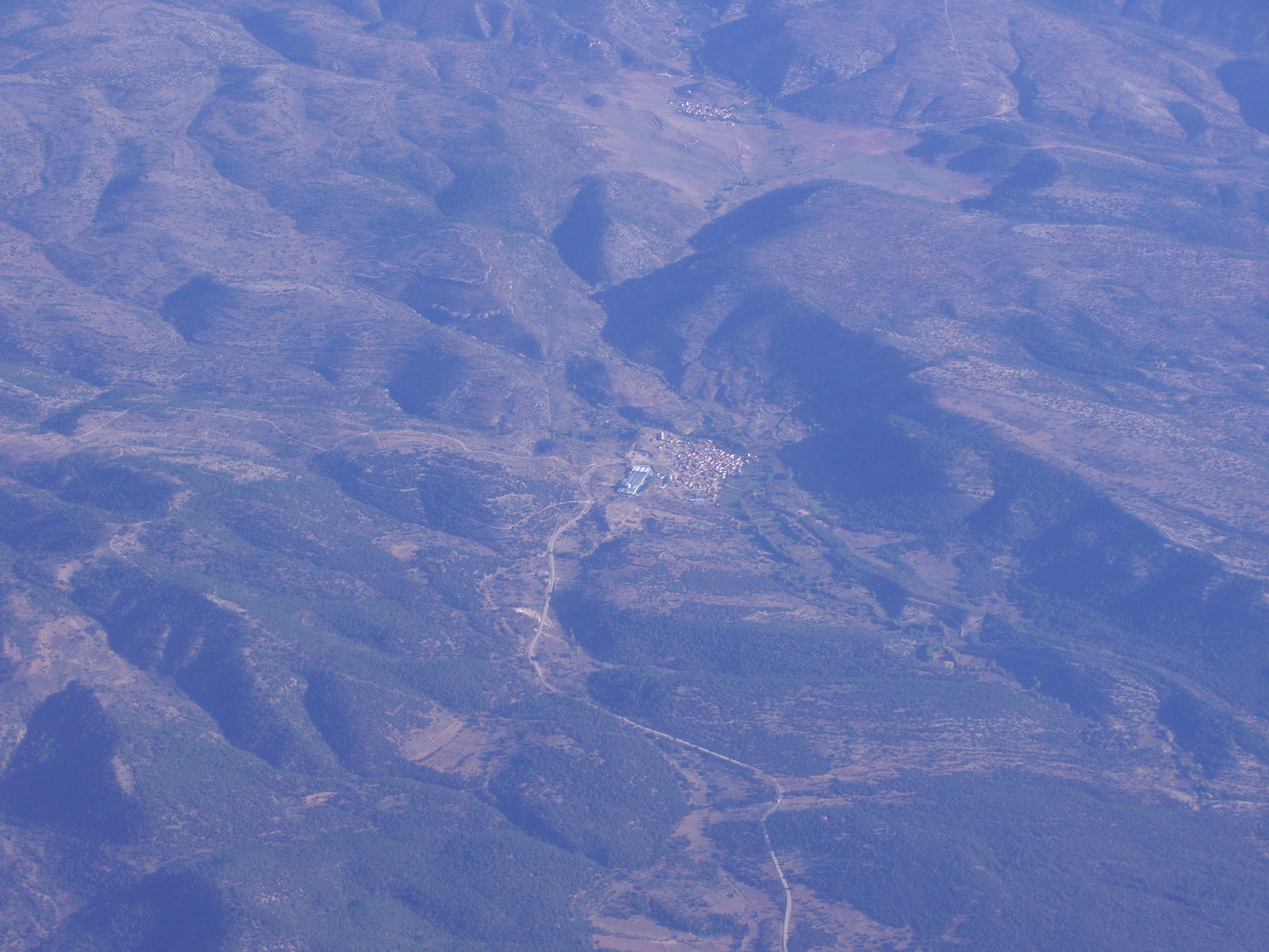 Imagen aérea donde se aprecian Huerta del Marquesado, Laguna del Marquesado y parte de la serranía de Cuenca.